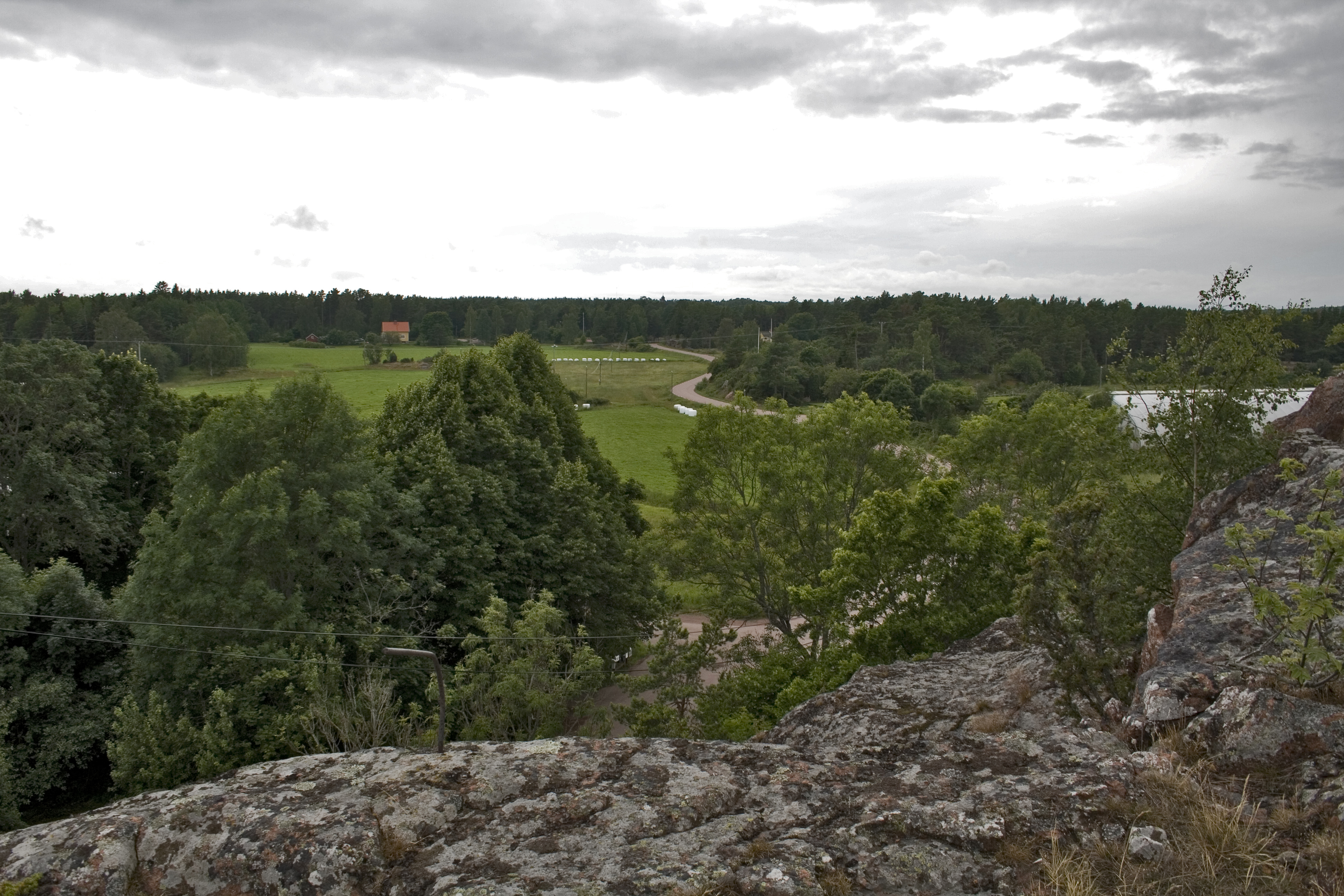 Näkymä yli Vårdön kylän, länteen